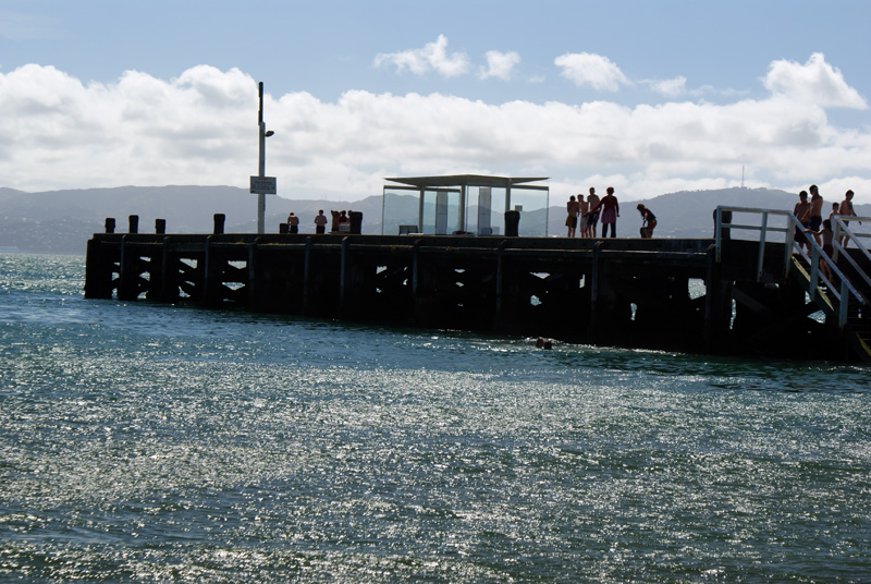 Day's Bay Wharf 2009